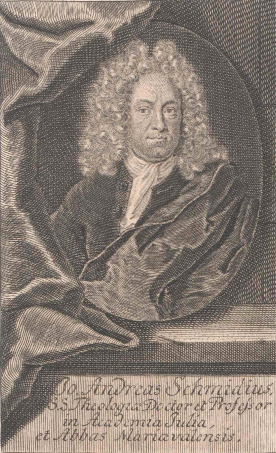 Johann Andreas Schmidt (1652–1726), Professor an der Universität Helmstedt.